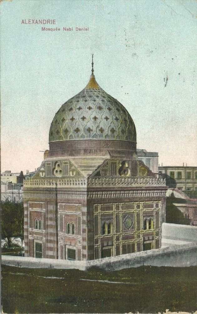 Nabi Daniel Mosque, 1918.